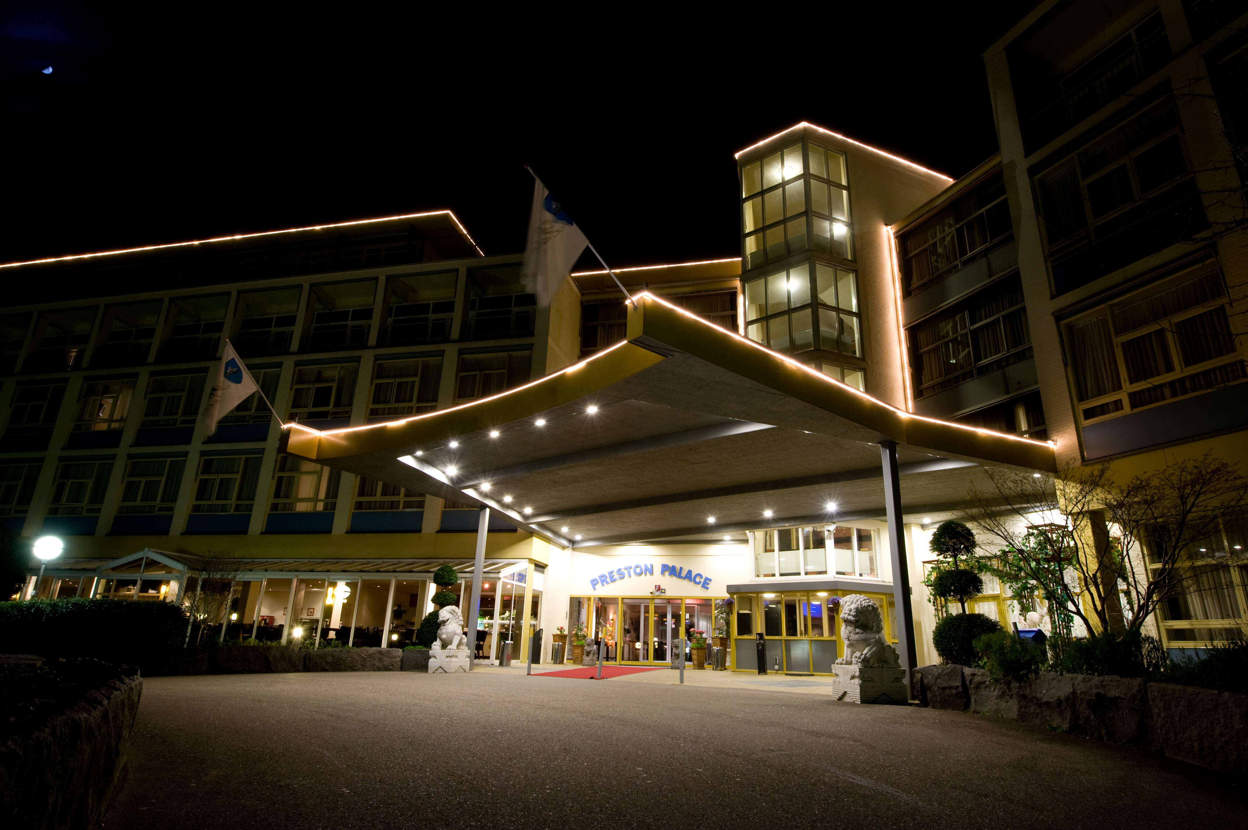 De entree van het hotel bij nacht